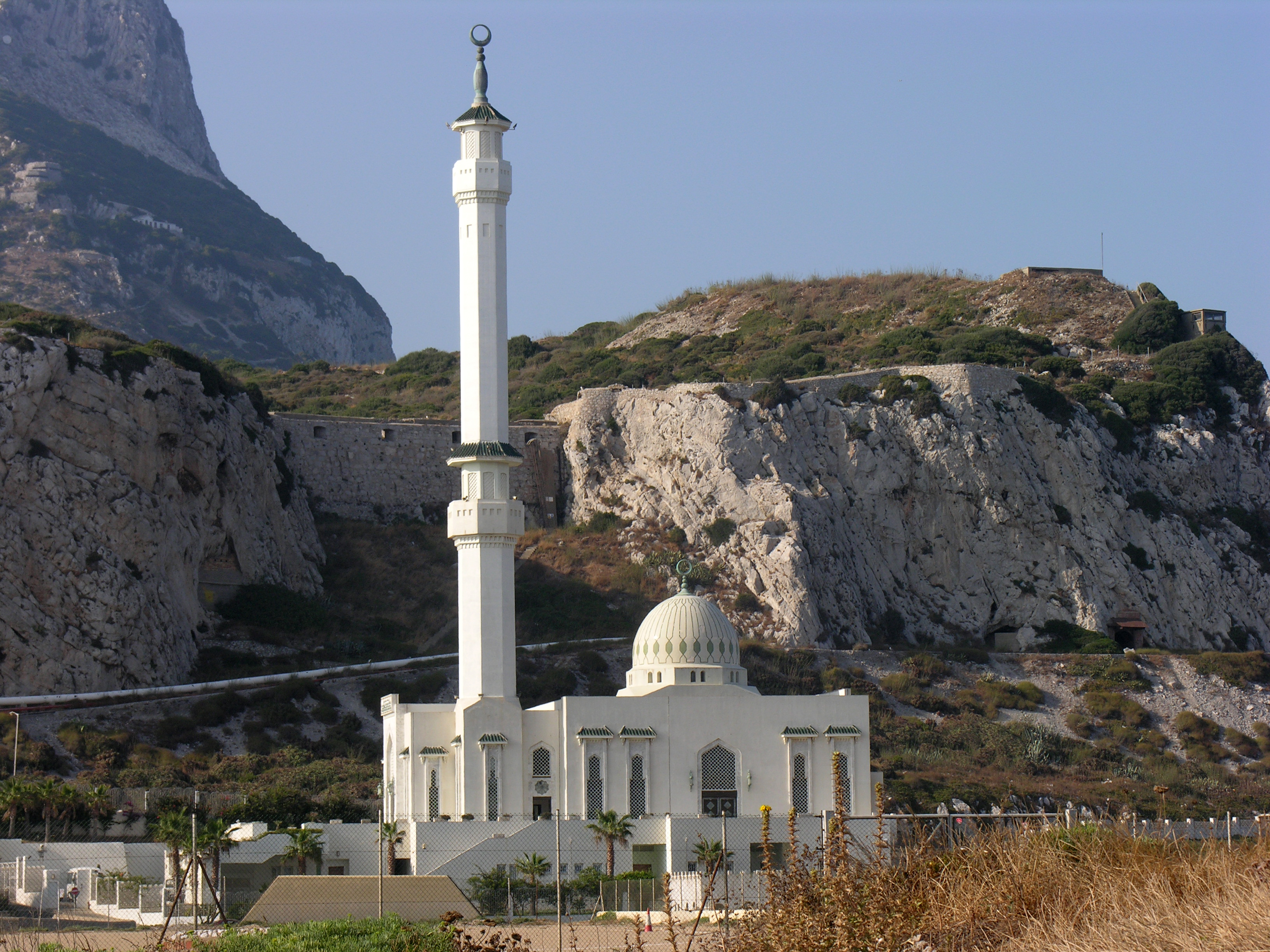 Pointe de l'Europe à Gibralta